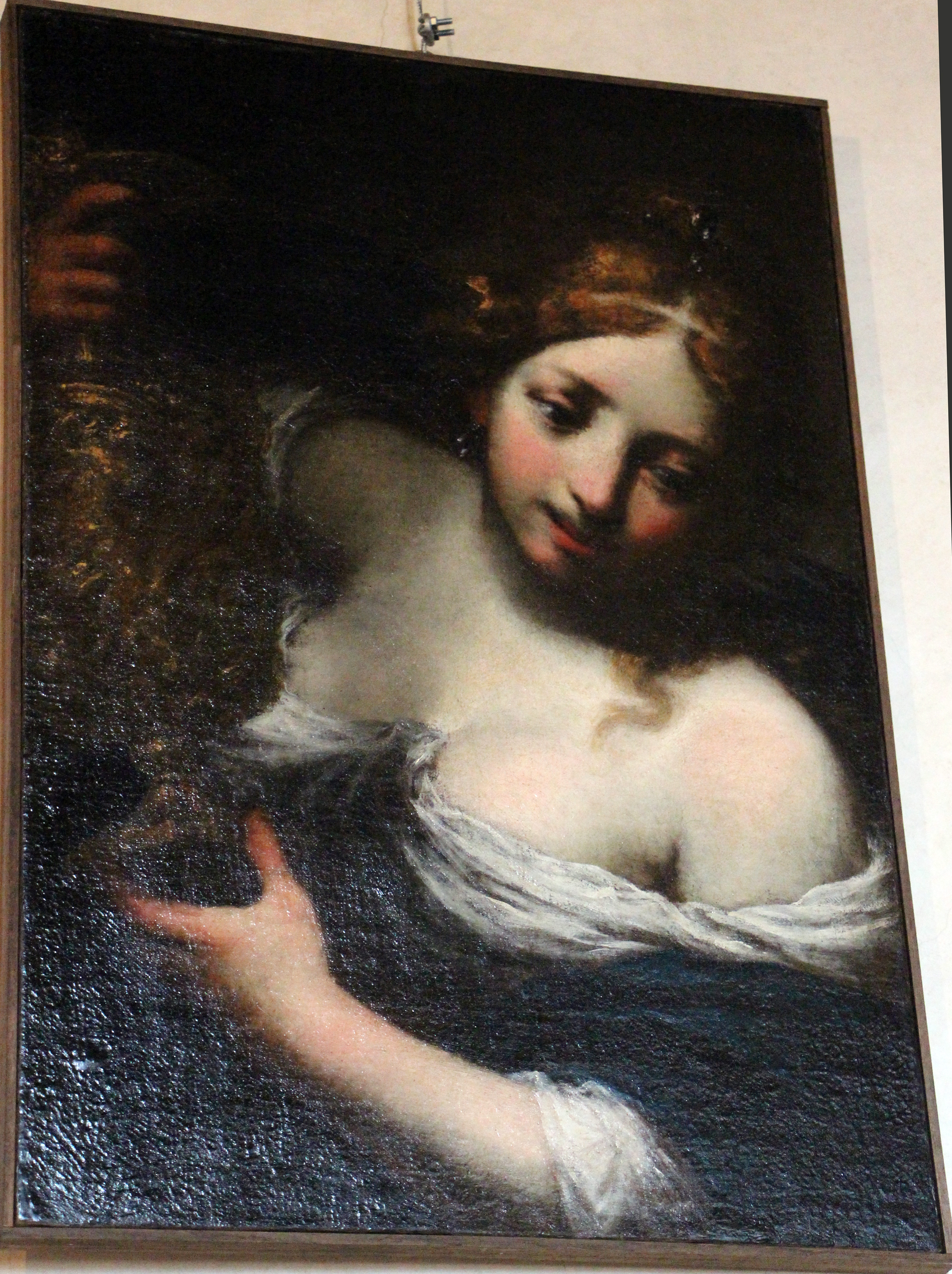 Villa medicea di Cerreto Guidi - MIBAC The making of this document was supported by Wikimedia CH. (Submit your project!) For all the files concerned, please see the category Supported by Wikimedia CH. This is a photo of a monument which is part of cultural heritage of Italy.